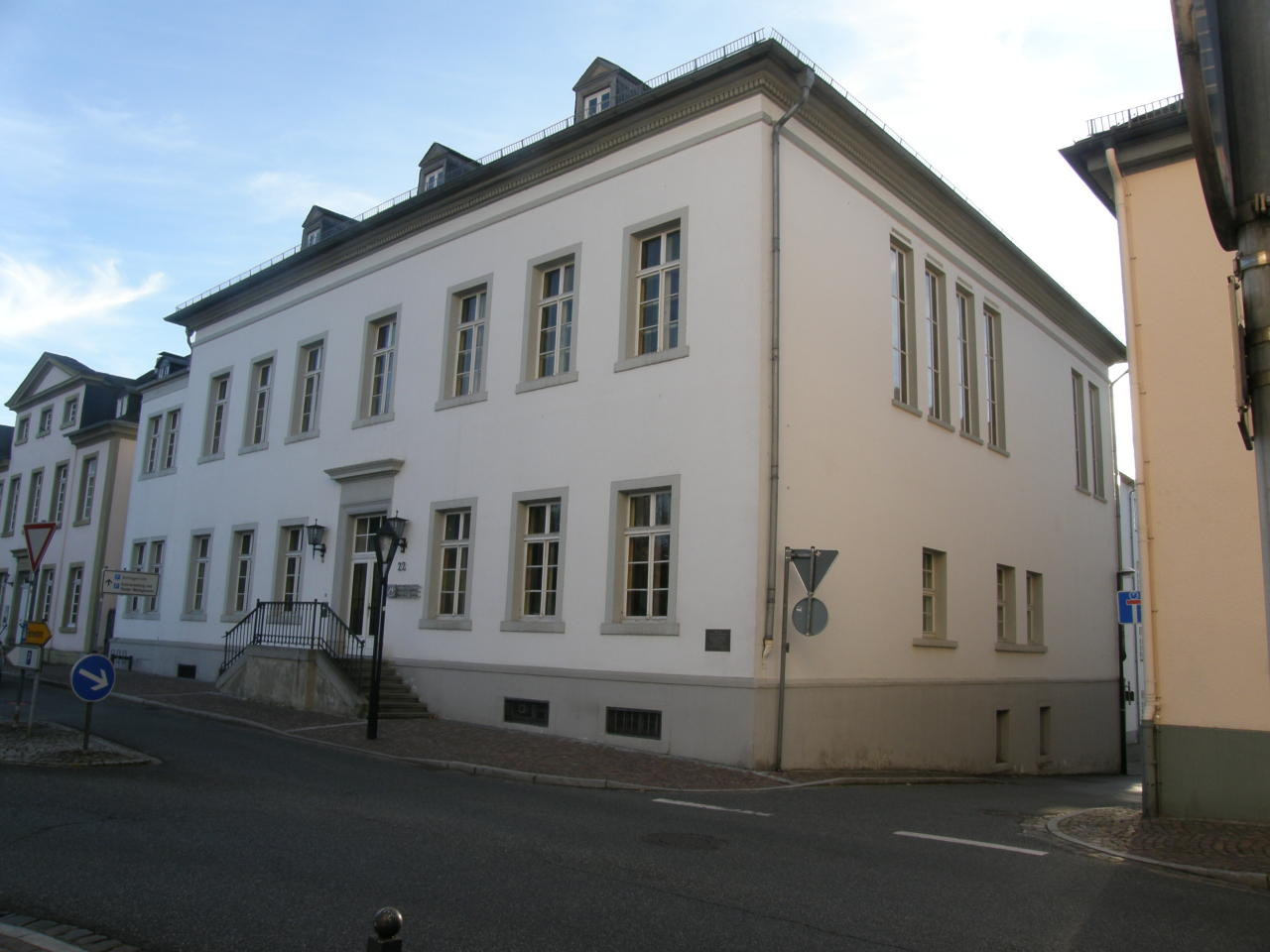 casino (new city hall)